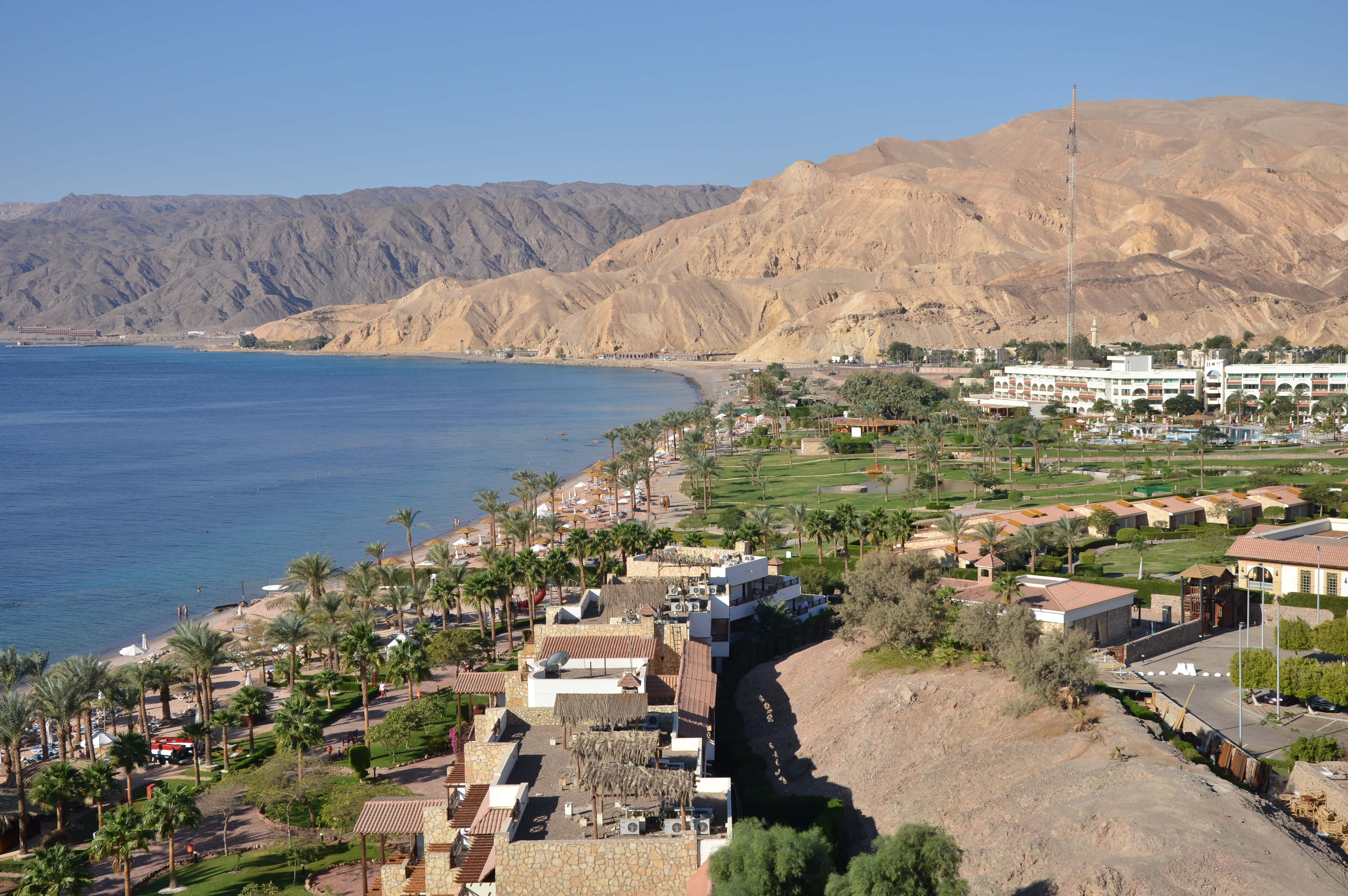 Pobřeží v Tabě